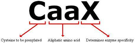 Image describing caax boox